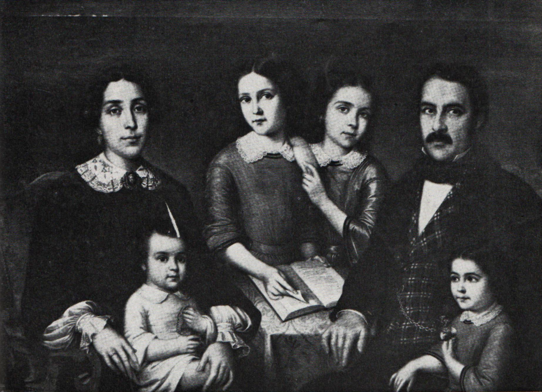 Familia Kretzulescu, 0,92x1,36m - Muzeul de Artă din Buzău.